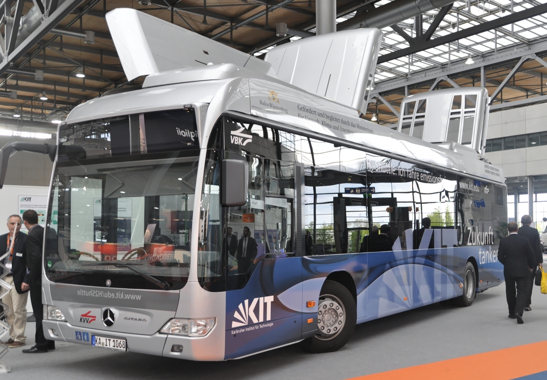 Hannover-Messe April 2012 Dieses Foto entstand durch die Mithilfe des gemeinnützigen Vereins Skillshare bei der Akkreditierung als Fotograf. Infos unter skillshare.eu Skillshare e.V. ist ein eingetragener gemeinnütziger Verein zur Förderung der Bildung durch Unterstützung der Erstellung, Sammlung und Verbreitung so genannten freien Wissens. IBAN: DE16 8306 5408 0004 8850 66 BIC: GENODEF1SLR Bank: VR-Bank Altenburger Land